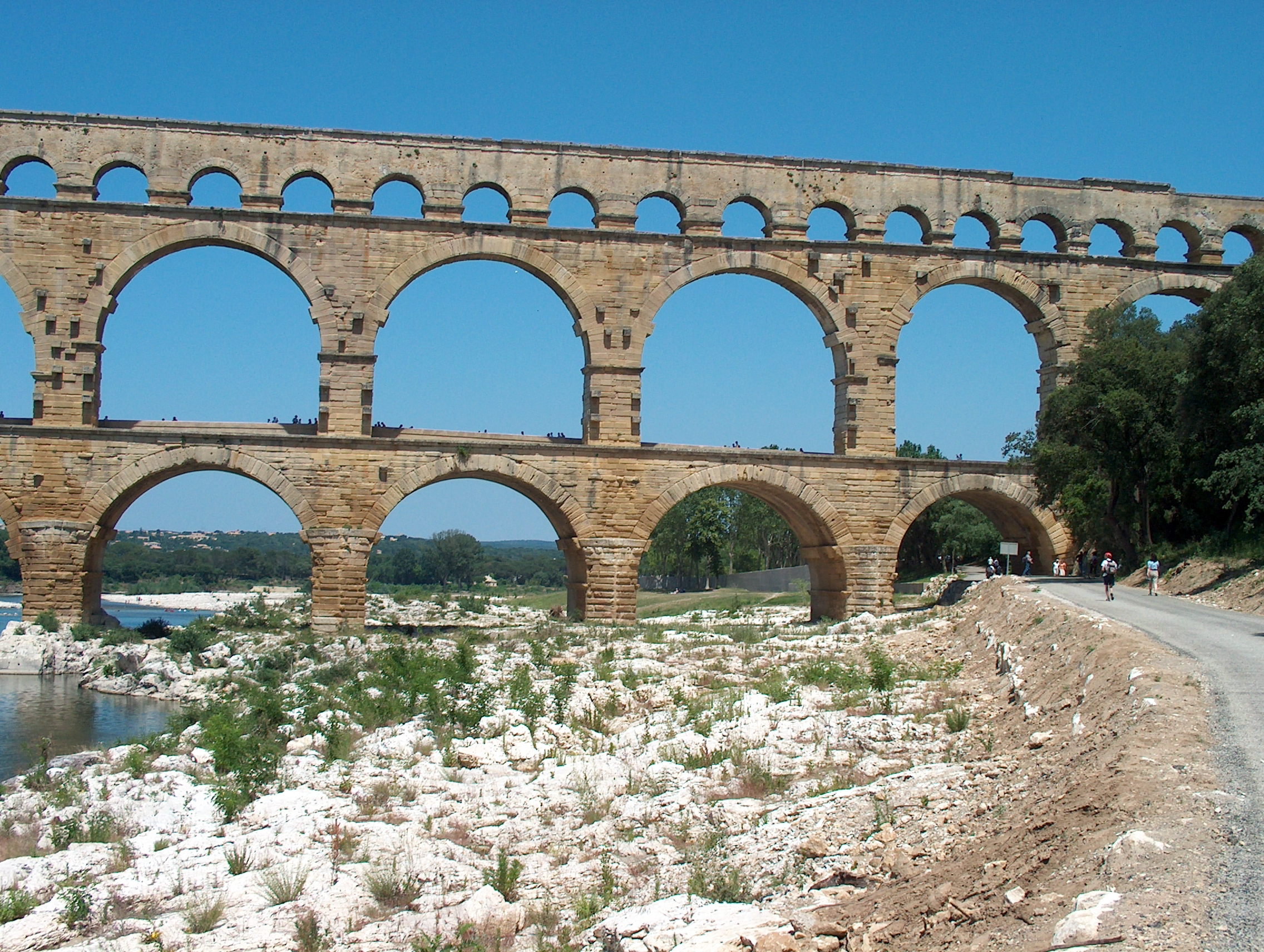 Das Aquädukt von Pont Du Gard (in Frankreich)